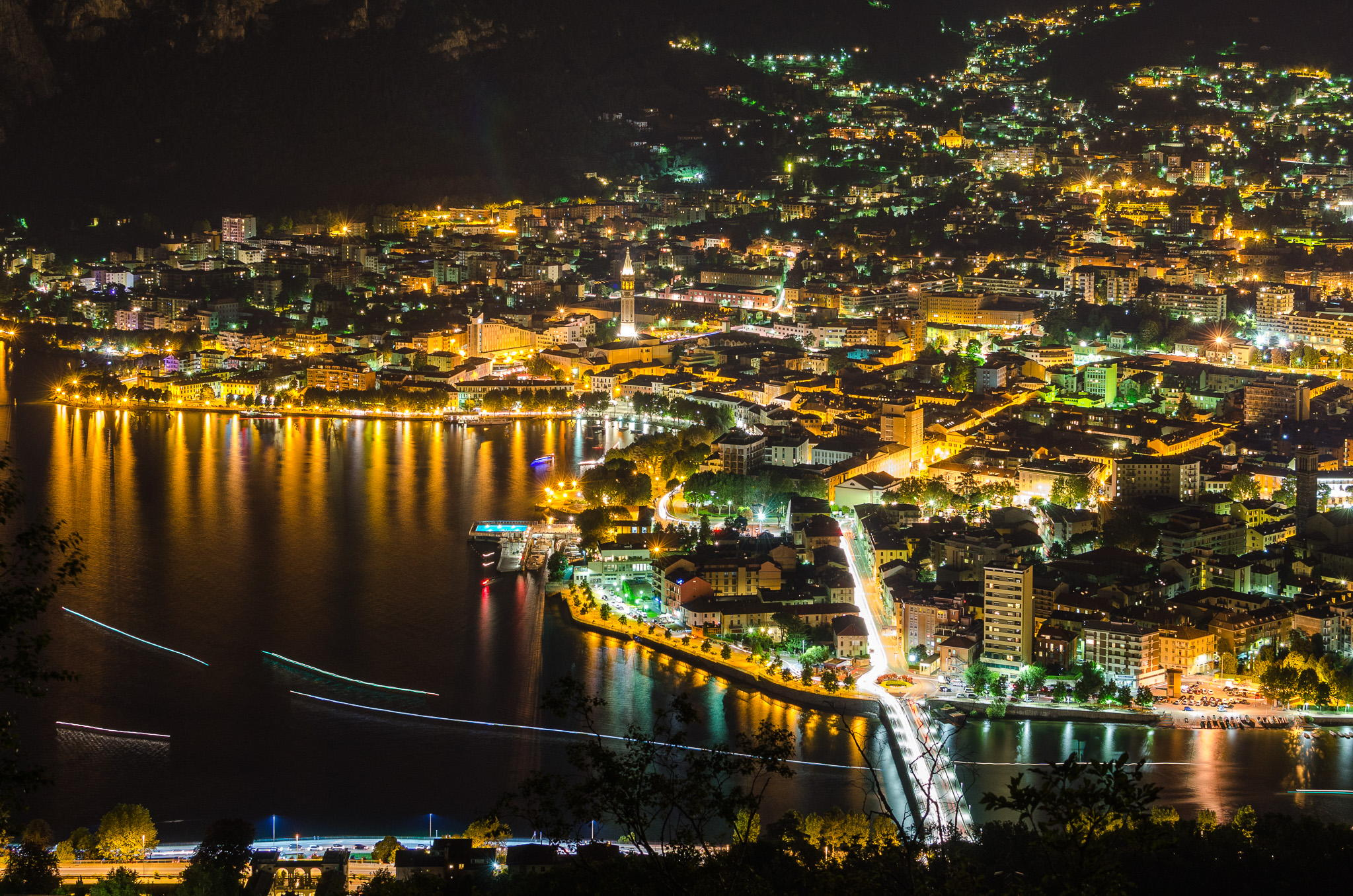 Panorama della città di Lecco vista di notte.